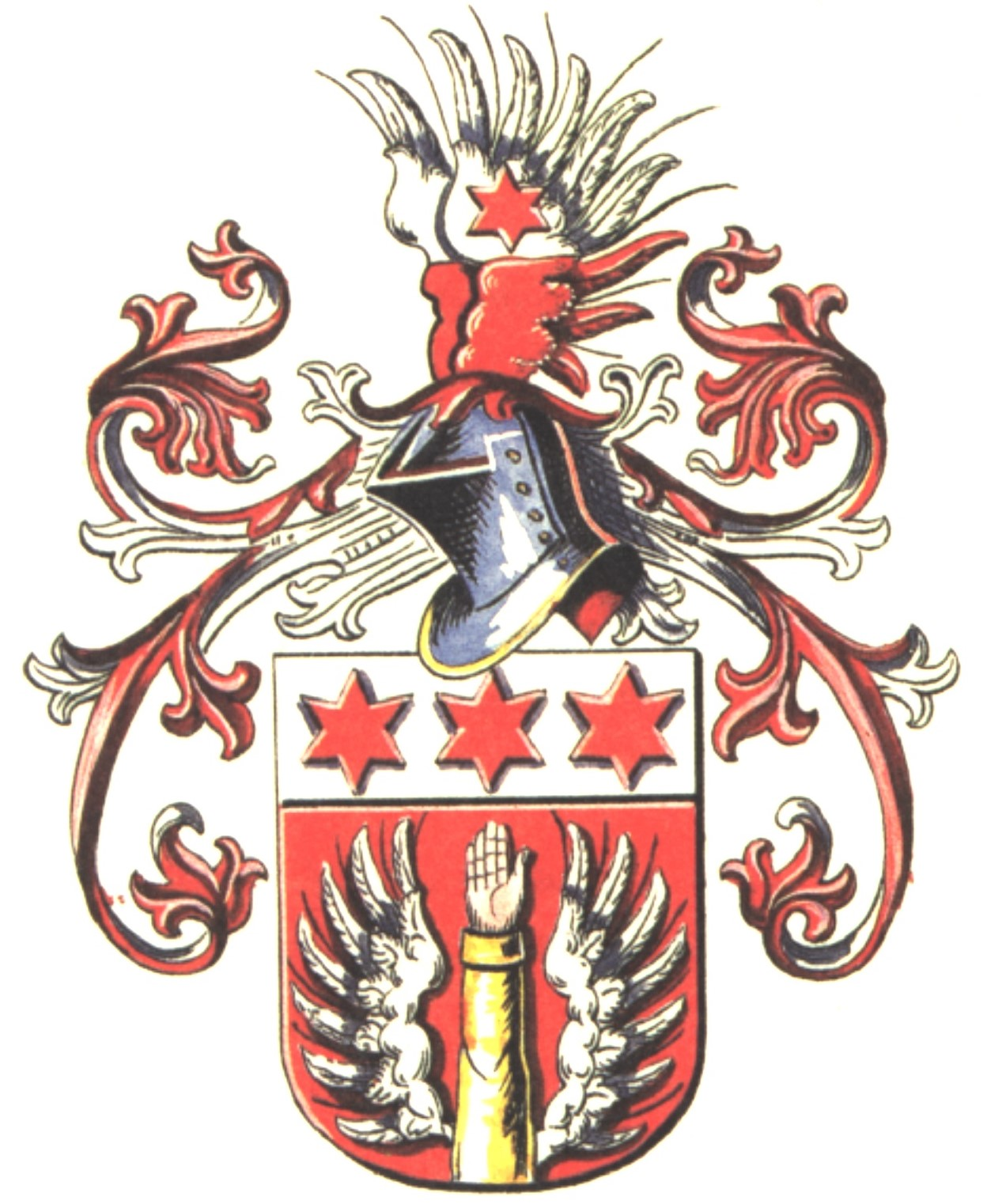 Stammwappen des Adelsgeschlechts Poschinger